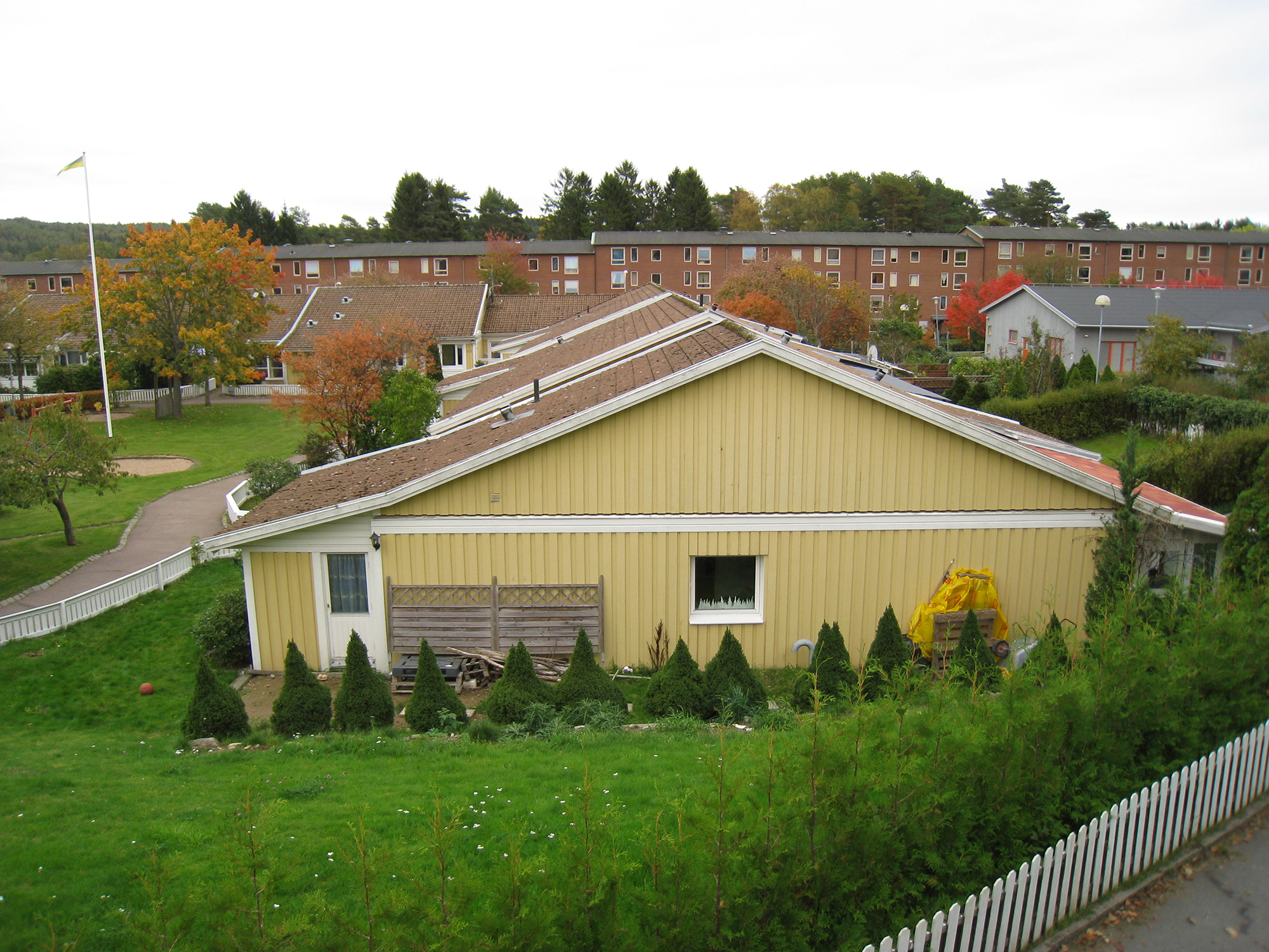 Housing estates. Stjärnbildsgatan overlooking Merkuriusgatan, Bergsjön, Göteborg